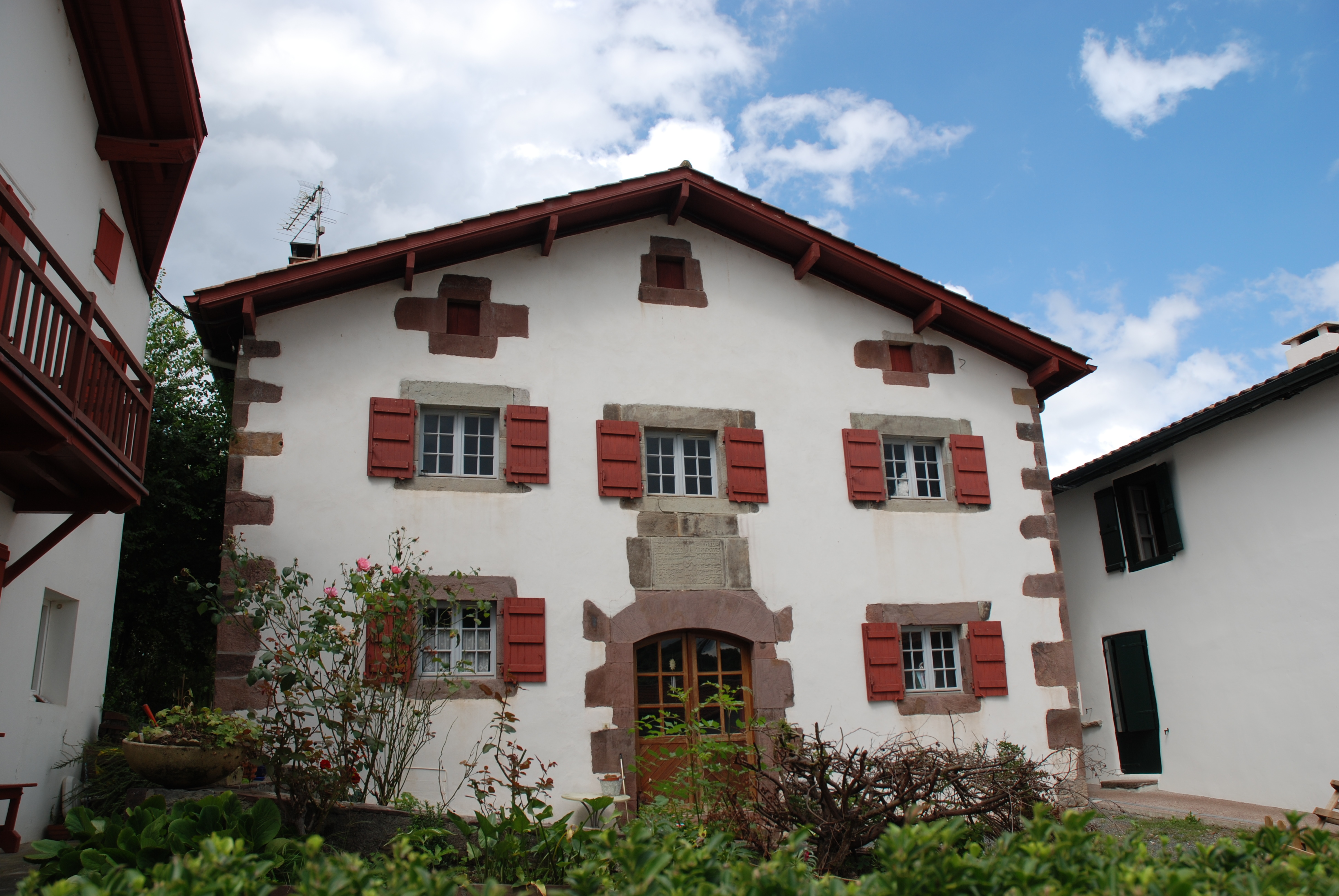 Lasse, maison de style bas-navarrais